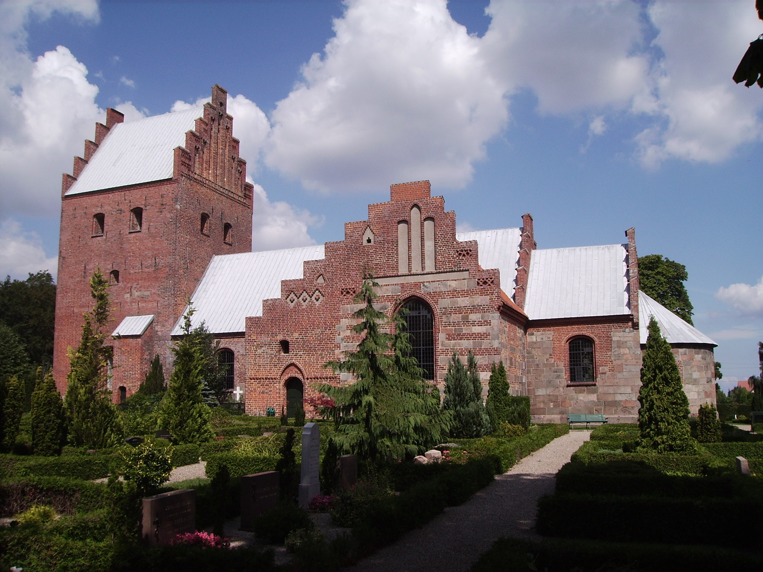 Fraugde Kirke, Fraugde Sogn, Åsum Herred, Odense Amt, Denmark (Danish Church) - Fraugde Kirke fra syd